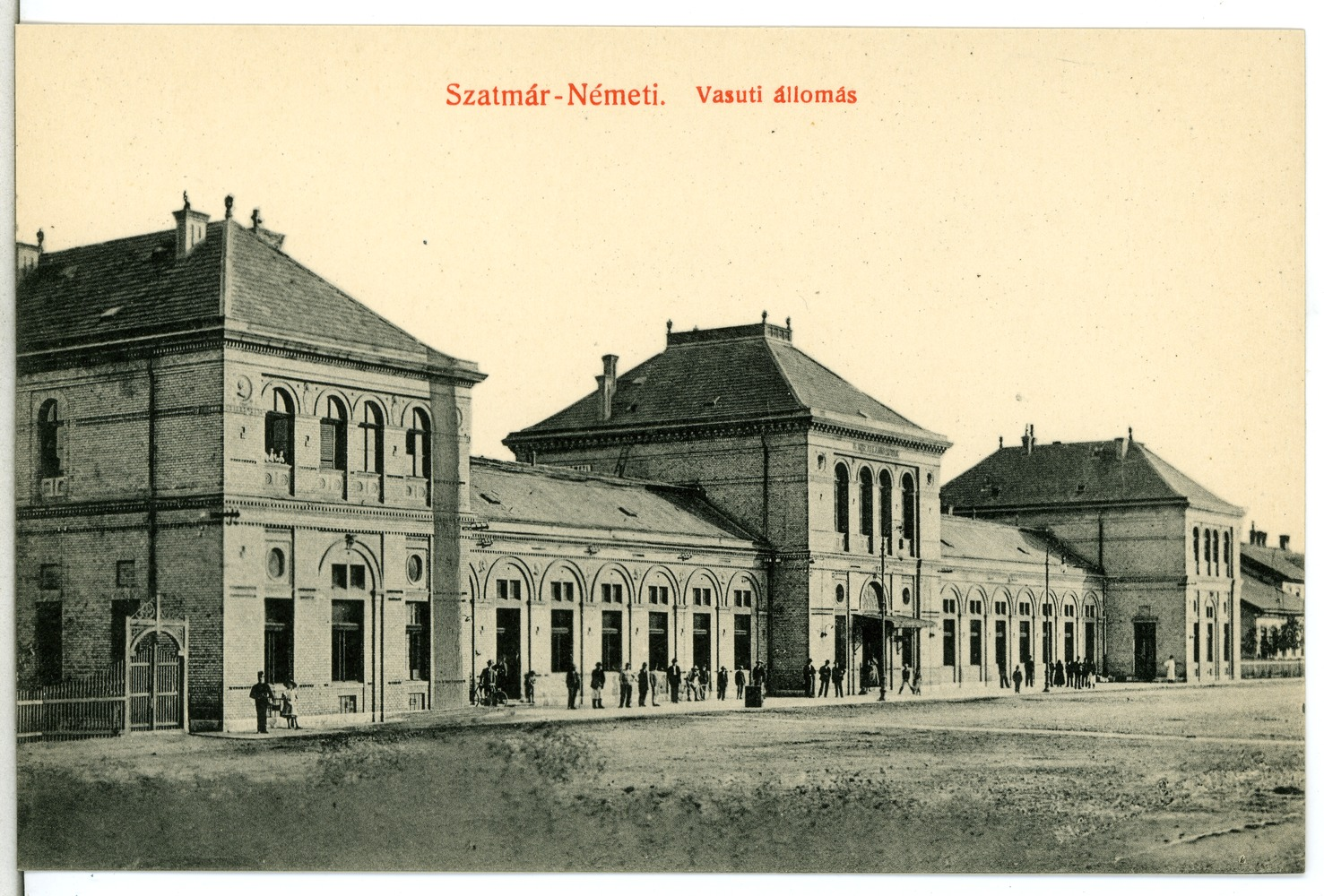 Szatmar-Nemeti; Vasuti allomas This postcard is from publisher Brück & Sohn in Meißen ( postcard has a unique number 13447 and is available in a higher resolution at the publisher. This images was uploaded in a cooperation project between Wikipedians and the publisher.